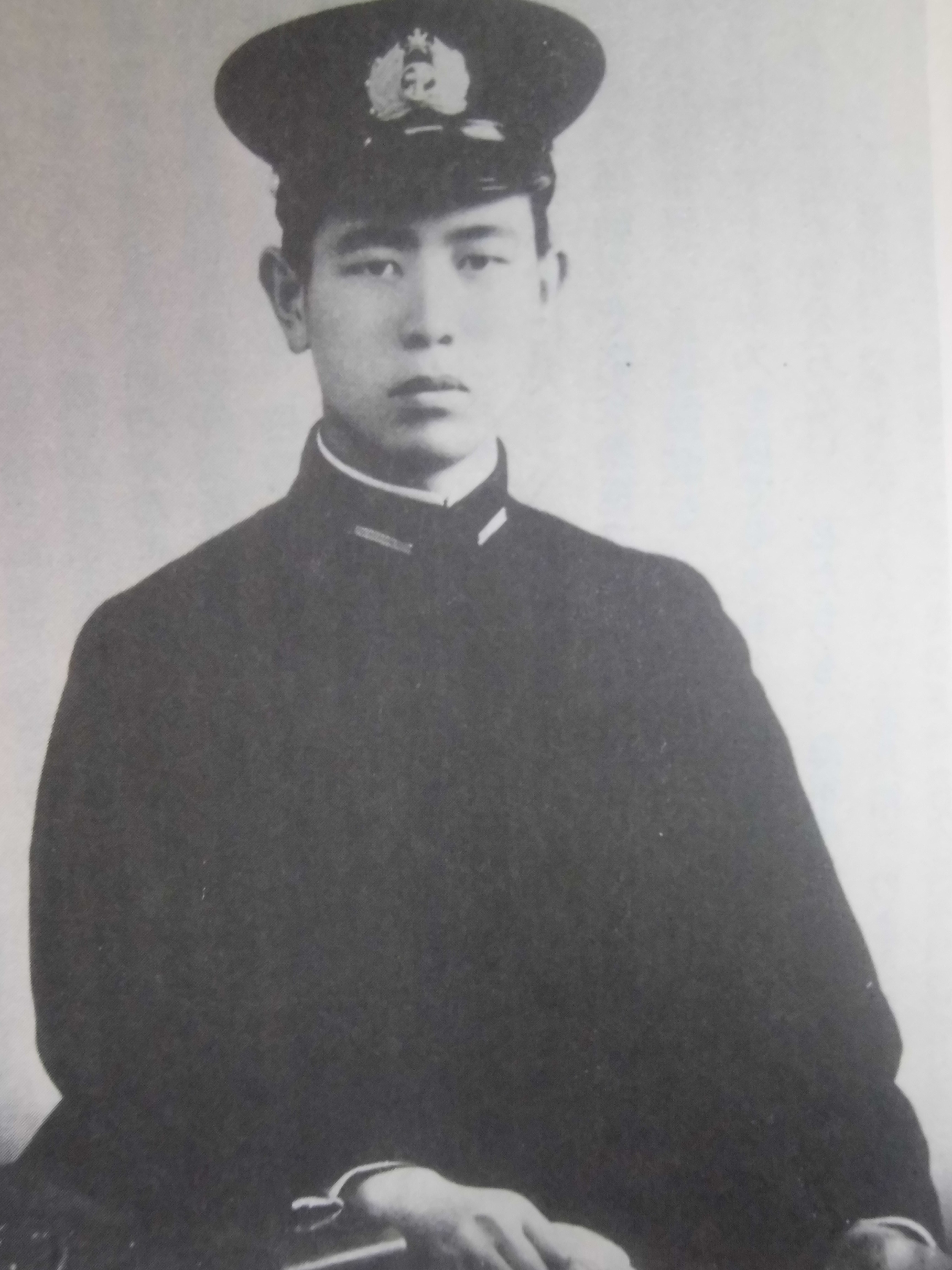 阿川弘之（Agawa Hiroyuki）